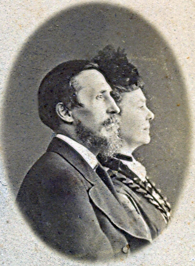 Пантелеймон Олександрович Куліш з дружиною Олександрою Михайлівною Білозерською-Куліш (Ганна Барвінок). Москва